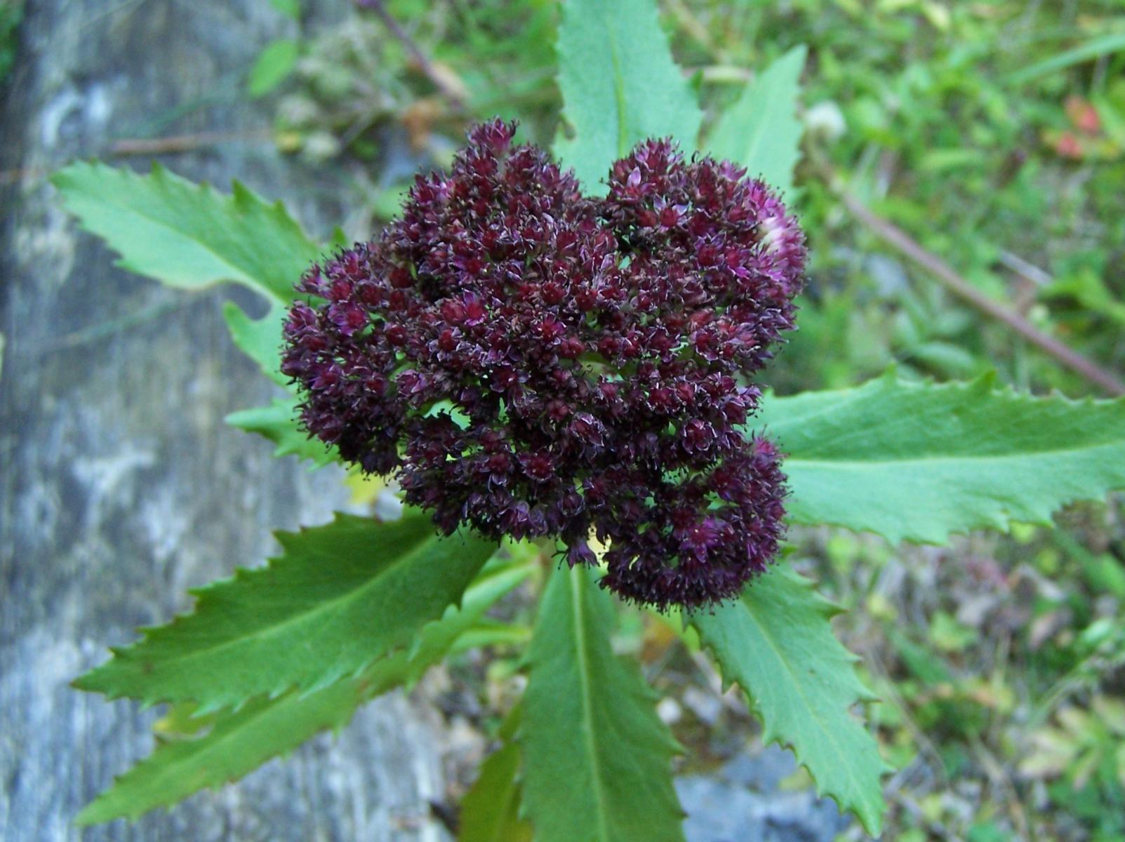 Sedum fabaria (pl. rozchodnik karpacki), habitat: Tatra Mountains Ciemniak, Czerwone Żlebki